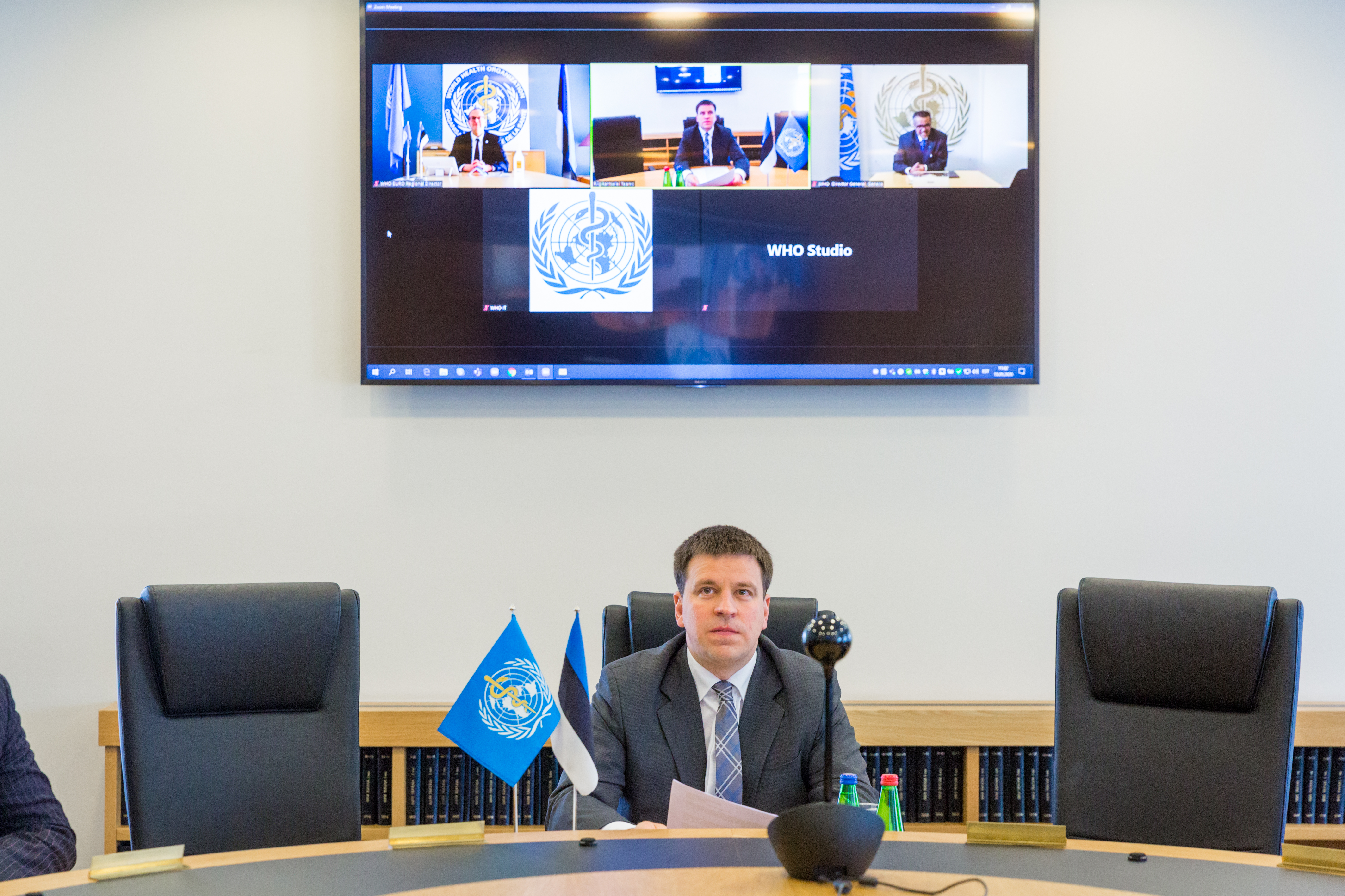 Jüri Ratase videokõne WHO peadirektoriga mais 2020